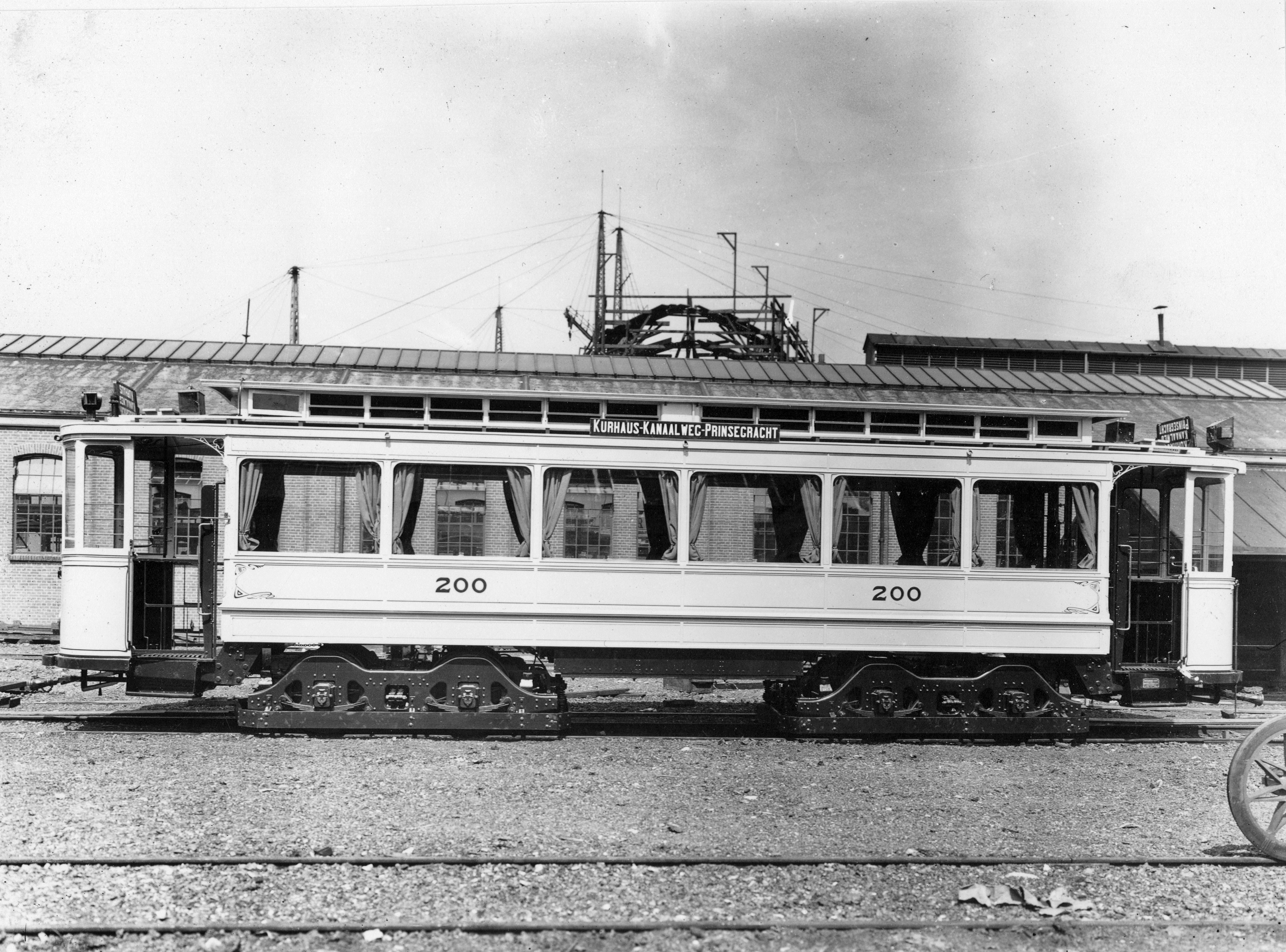 Afbeelding van een fabrieksnieuwe tram (motorwagen nr. 200) voor de Haagse Tramweg Maatschappij (H.T.M.) bij Werkspoor te Amsterdam of Zuilen.